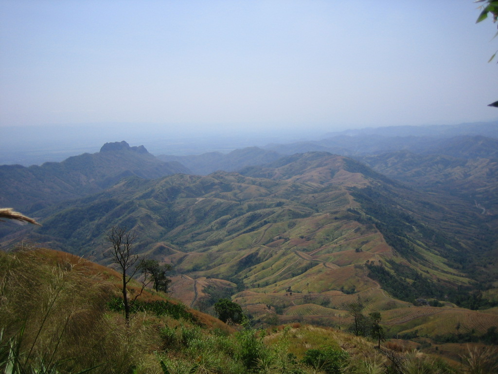 View over Phu Hin Rong Kla National Park, Blick über den Phu Hin Rong Kla Nationalpark, Foto von Martin Püschel, 23.02.2006